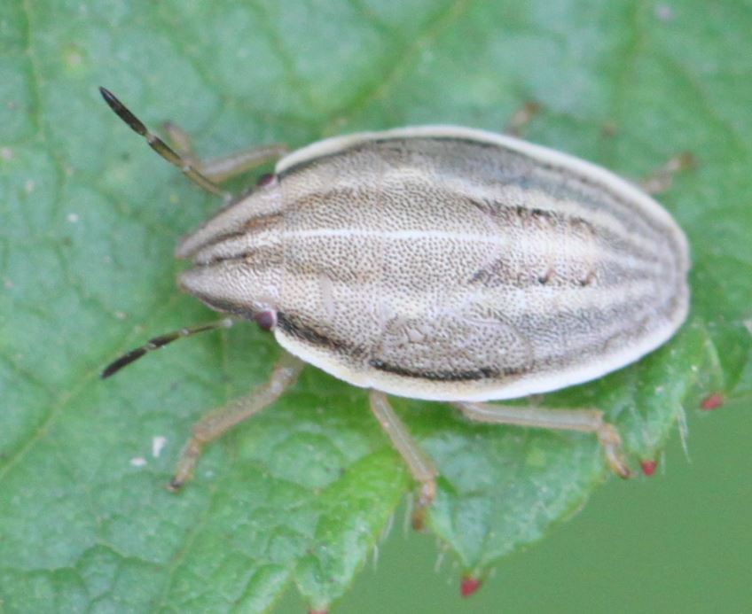 Nymphe der Getreidewanze (Aelia acuminata) am 27.6.2017 in der Schwetzinger Hardt